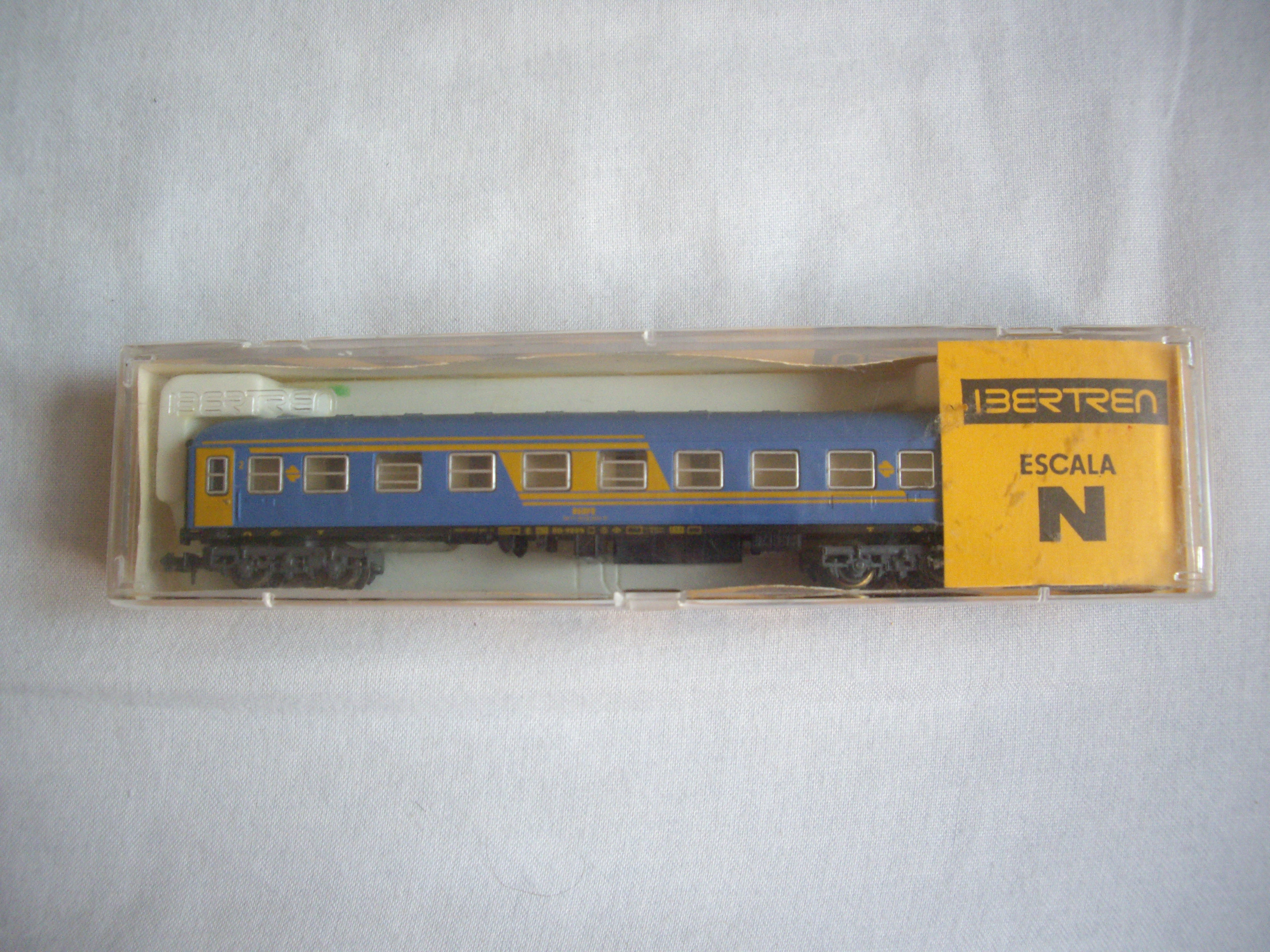 reproducción en miniatura a escala N del coche viajeros de RENFE serie 8000 de IBERTREN